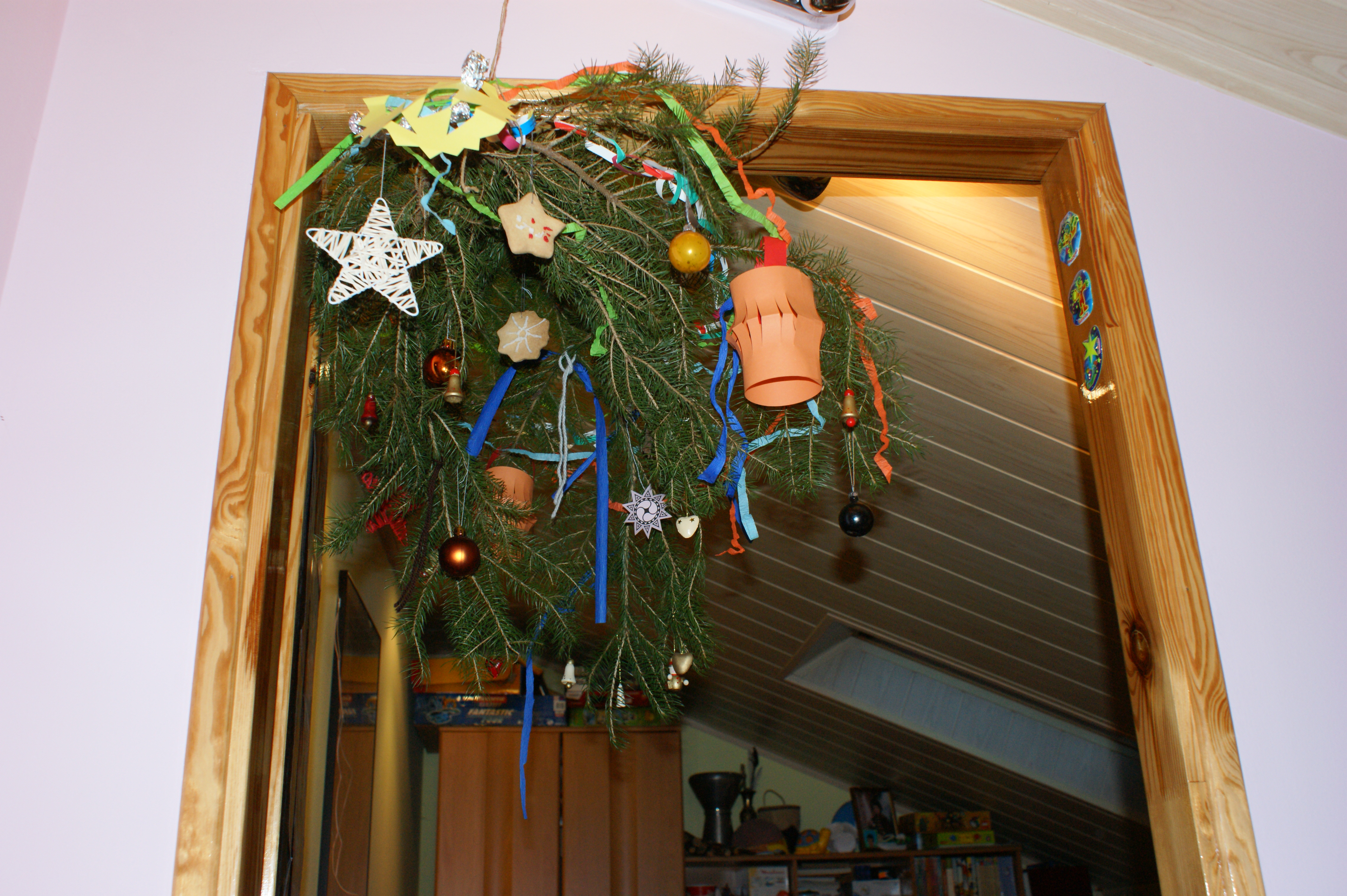 Podłaźniczka - udekorowana gałąź jodły, świerku lub sosny wieszana pod sufitem, nad drzwiami lub nad oknem (Rodzimowierstwo - Mitologia Słowian żywa).